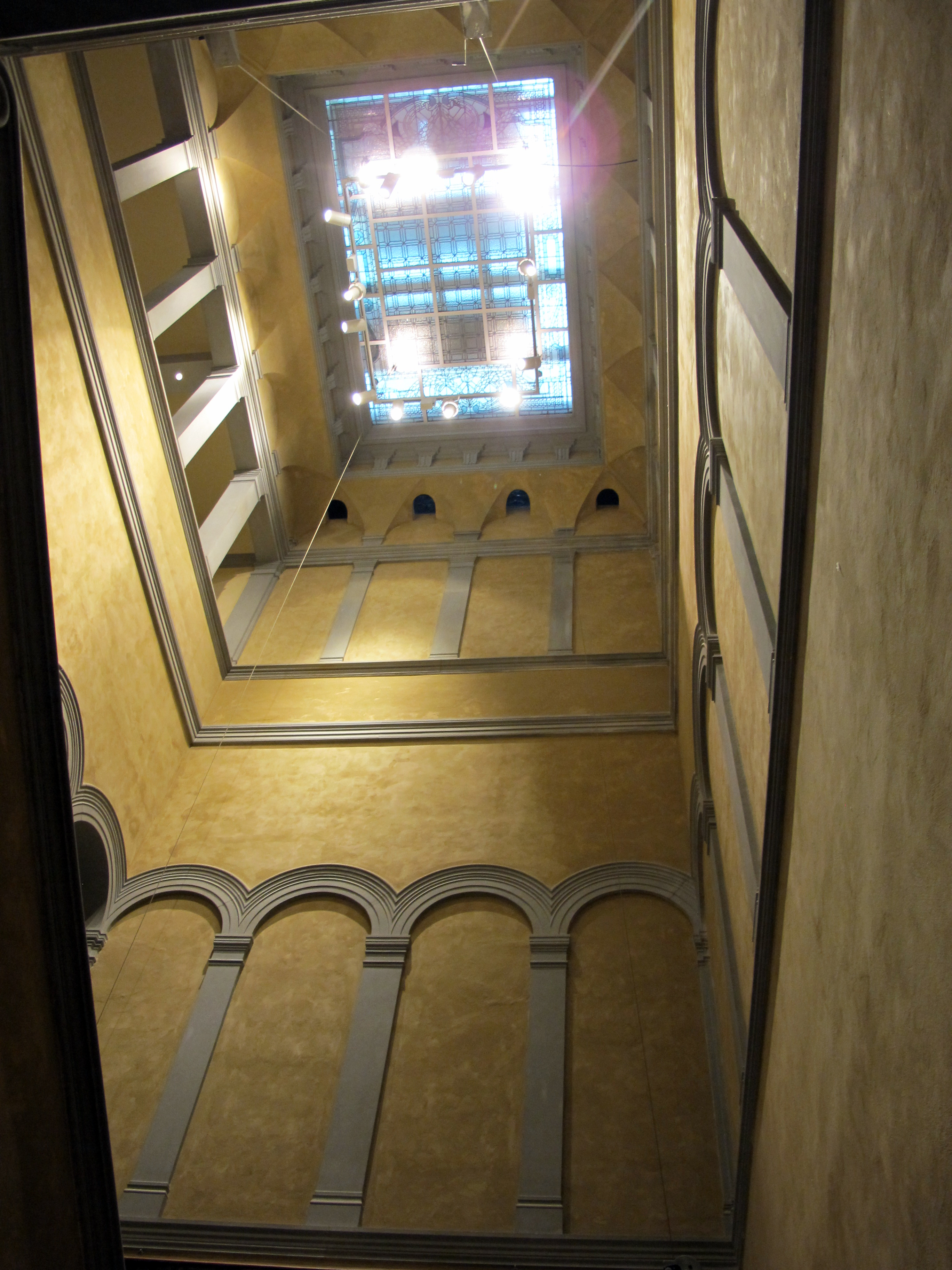 Villa il salviatino, scalone